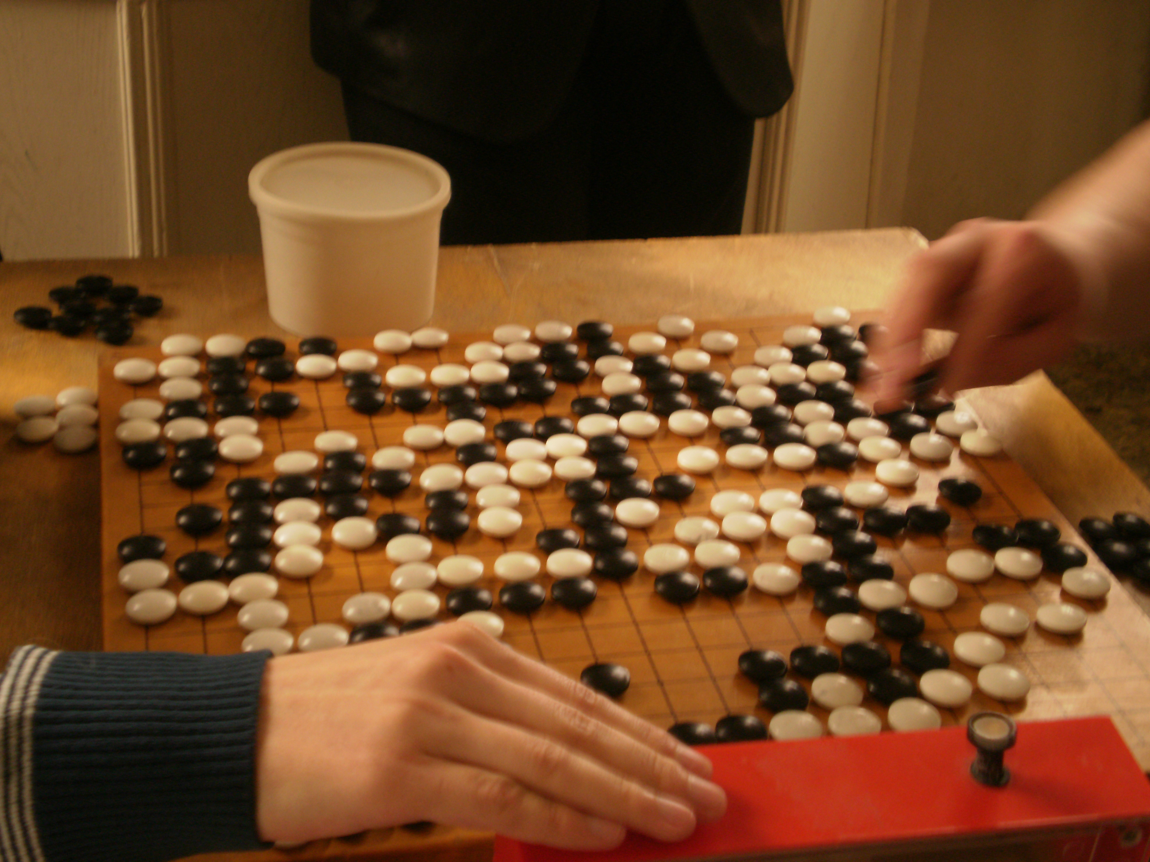 Партия с чемпионата Ярославля по го 2011